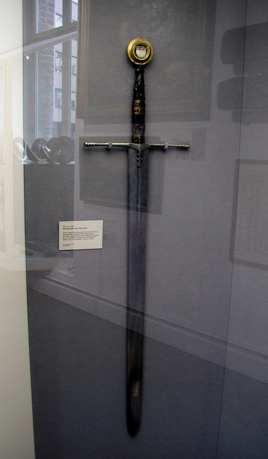 Kölner Richtschwert (Zeughaus)